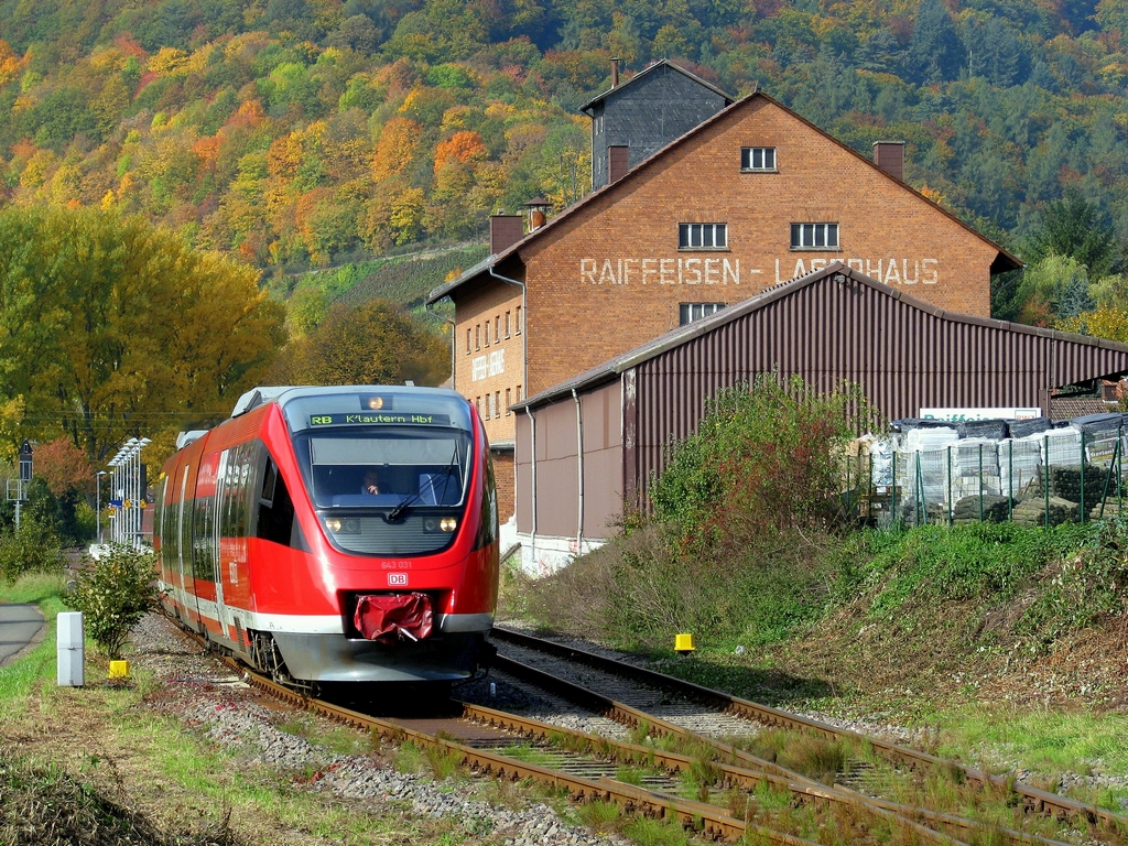 643 031 verlässt gerade den Bahnhof Wolfstein und befindet sich auf dem Weg nach Kaiserslautern Hbf